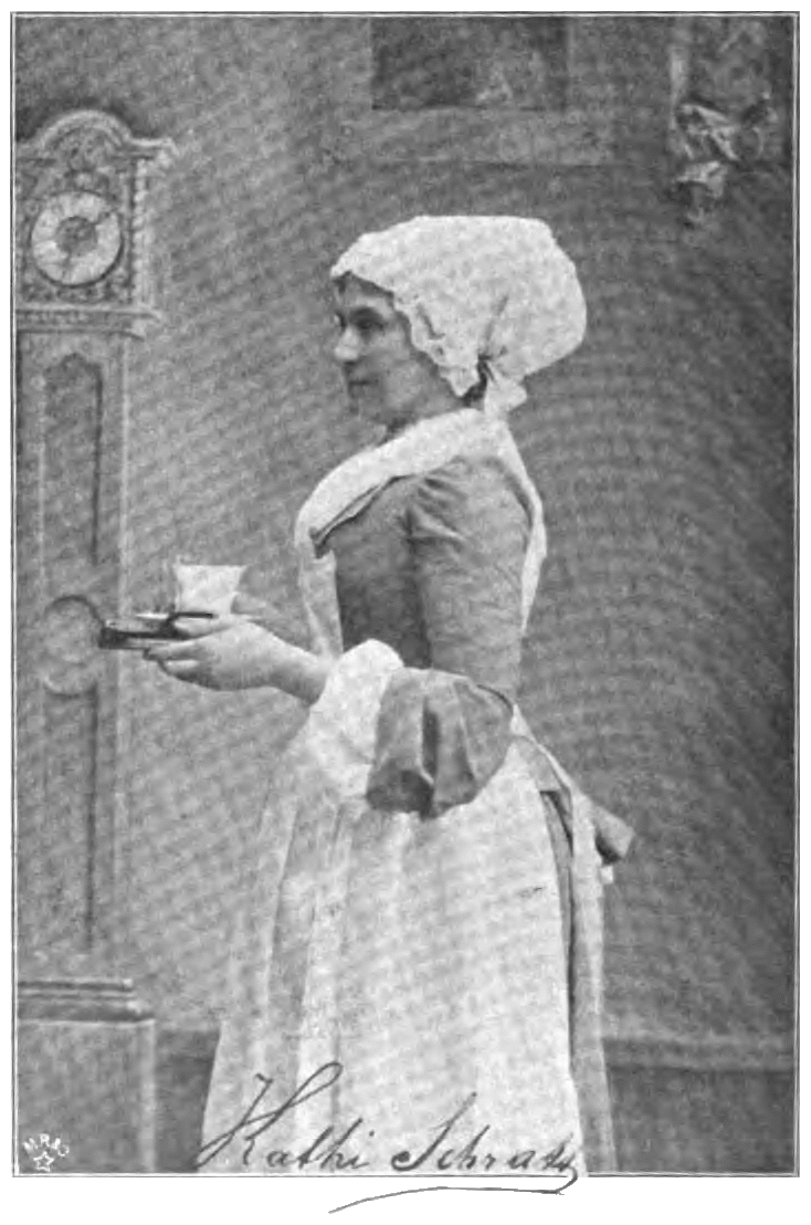 Kathi Schratt in „Die kleine Mama“Katharina Schratt (1853–1940), Austrian actress